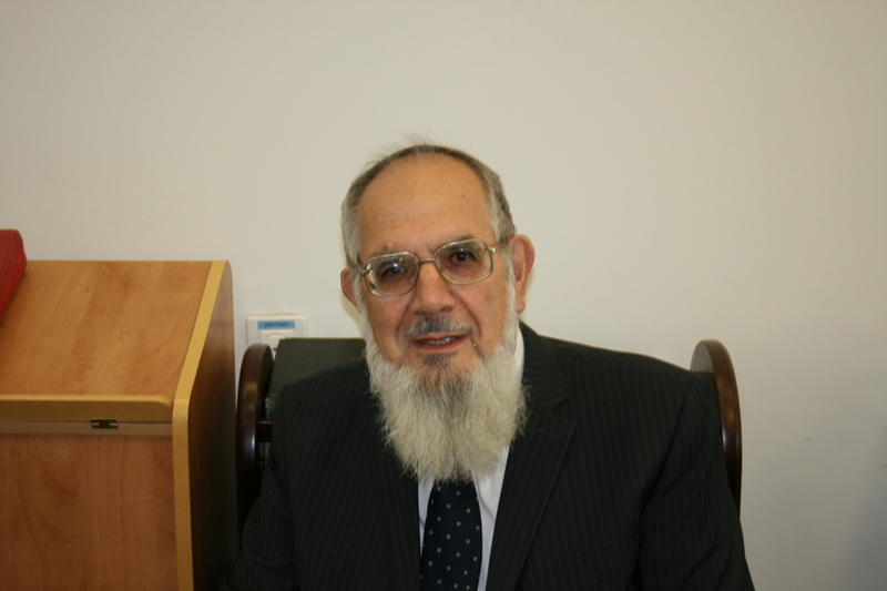 הרב נחום אליעזר רבינוביץ רישיון נוצר על ידי משתמש:Atbannett